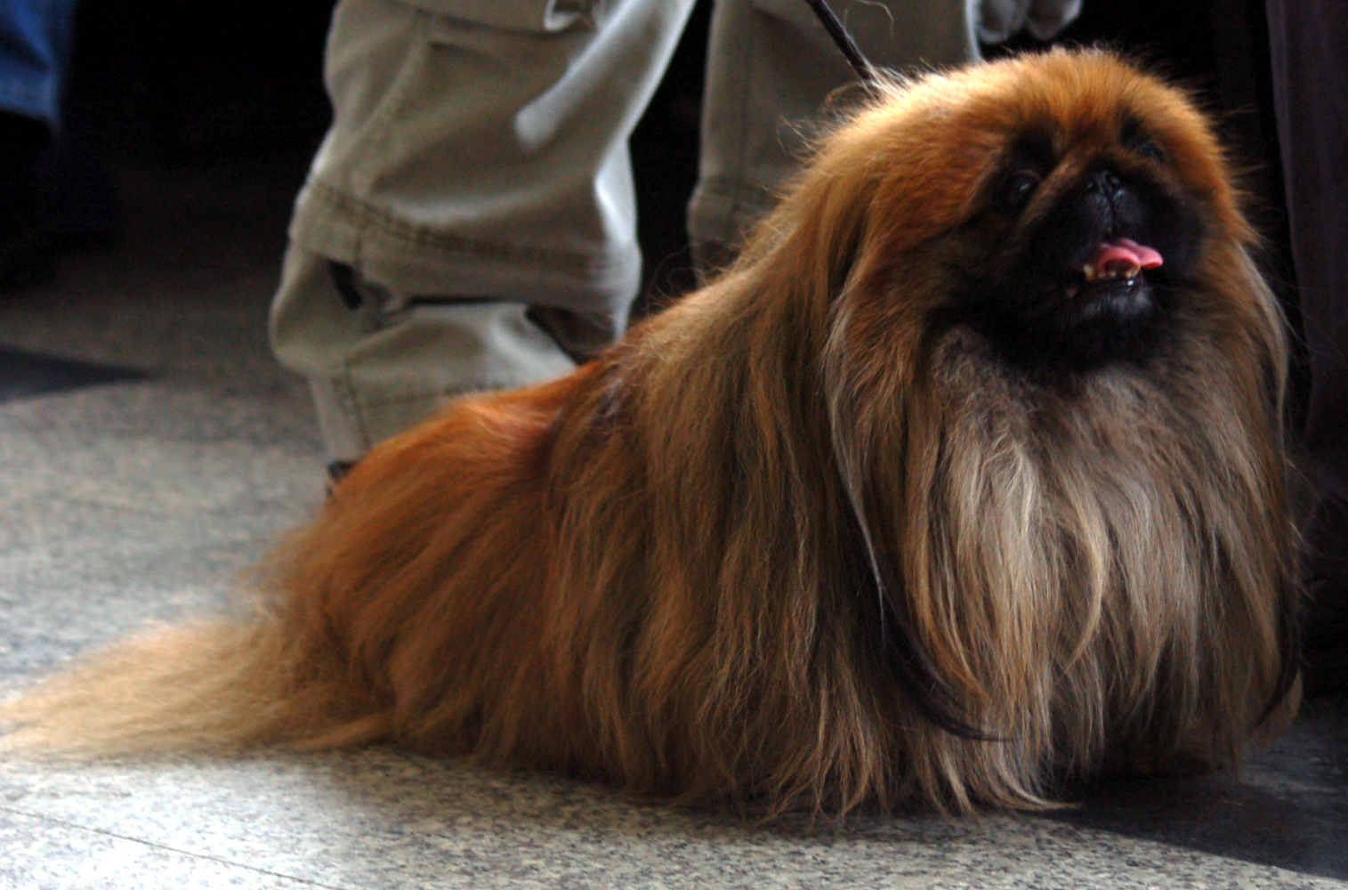 Pekińczyk